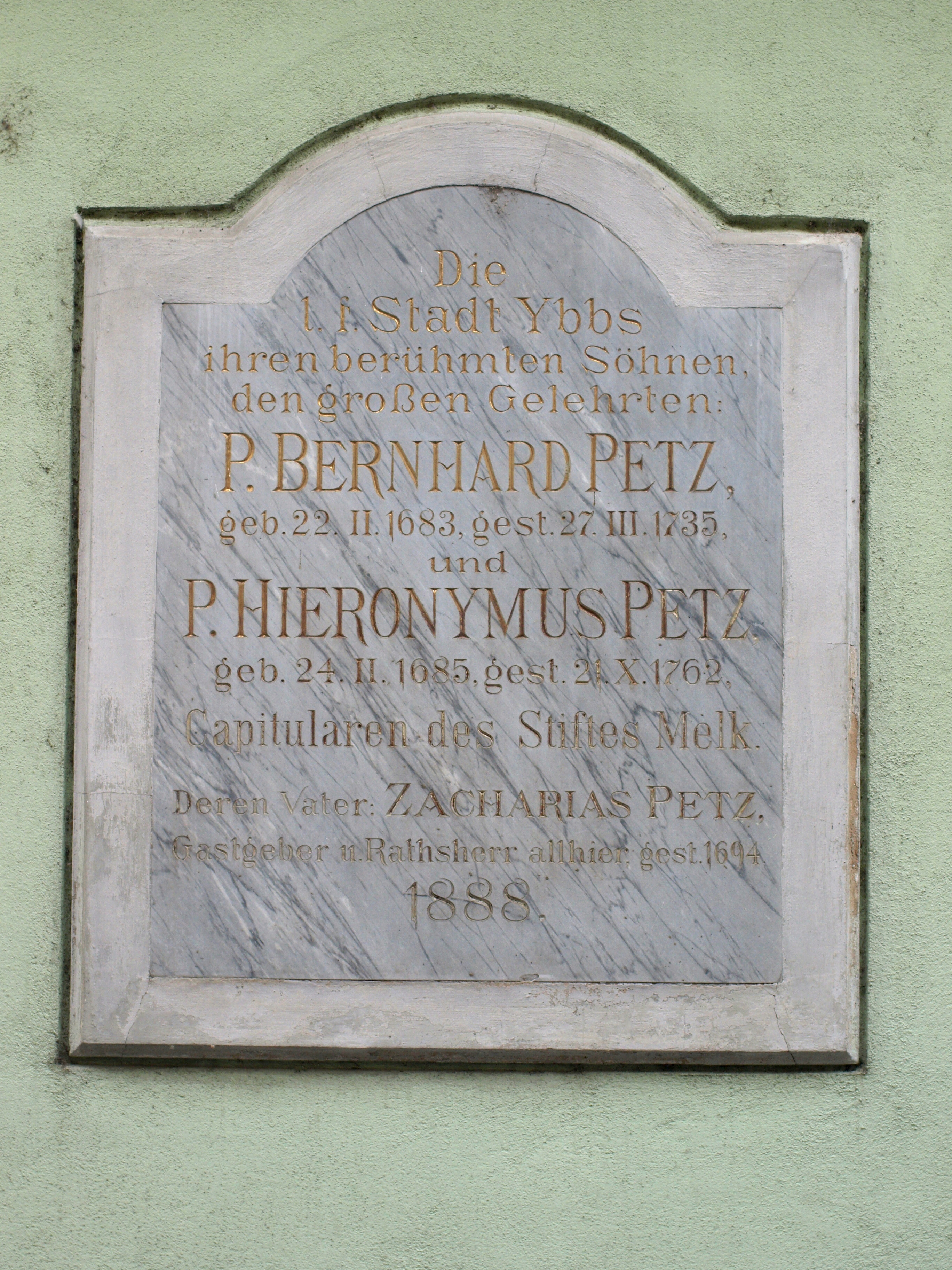 Wohnhaus, ehem. Salzamt/ehem. Schule